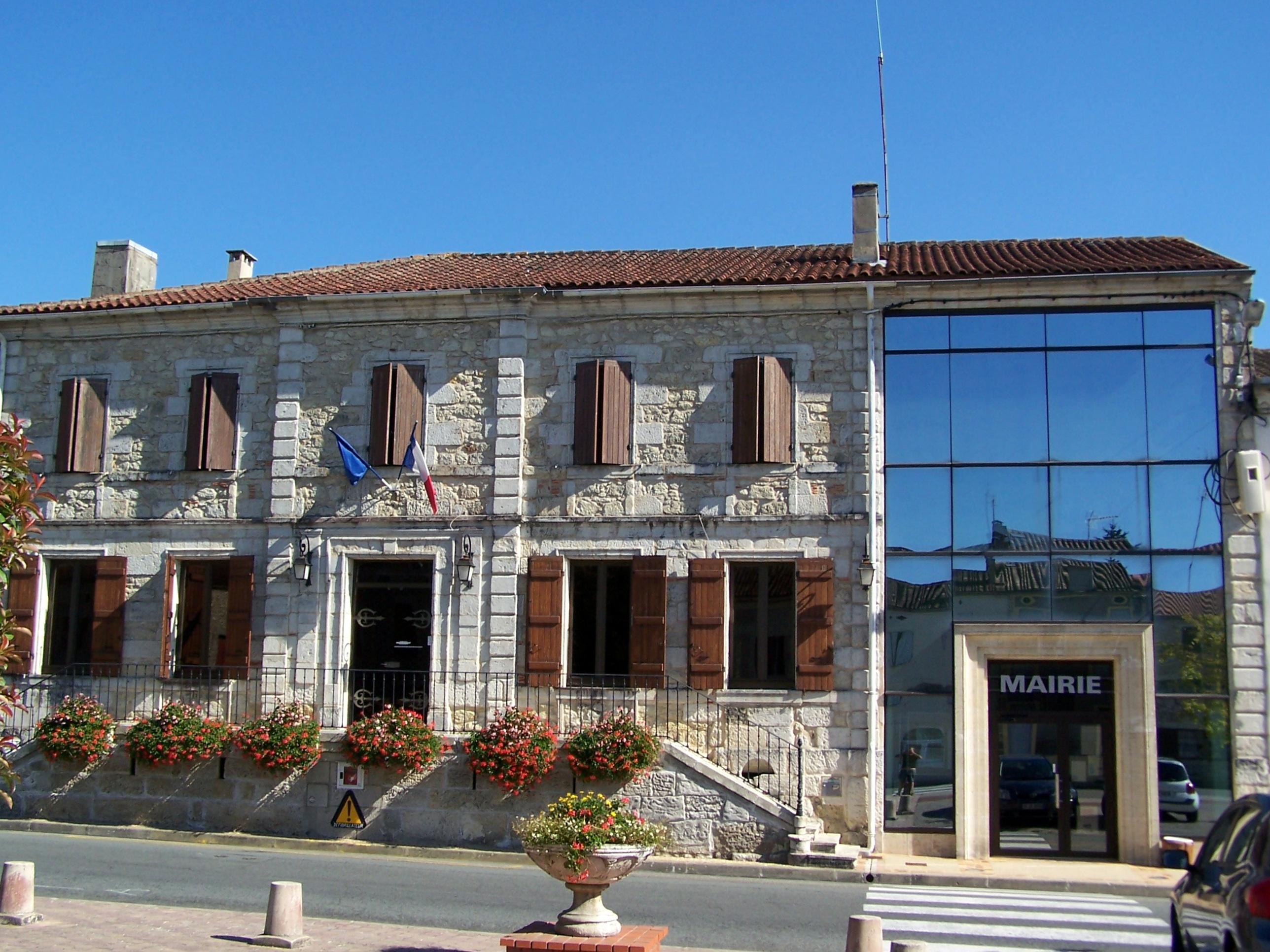 Mairie de Grignols (Gironde, France)